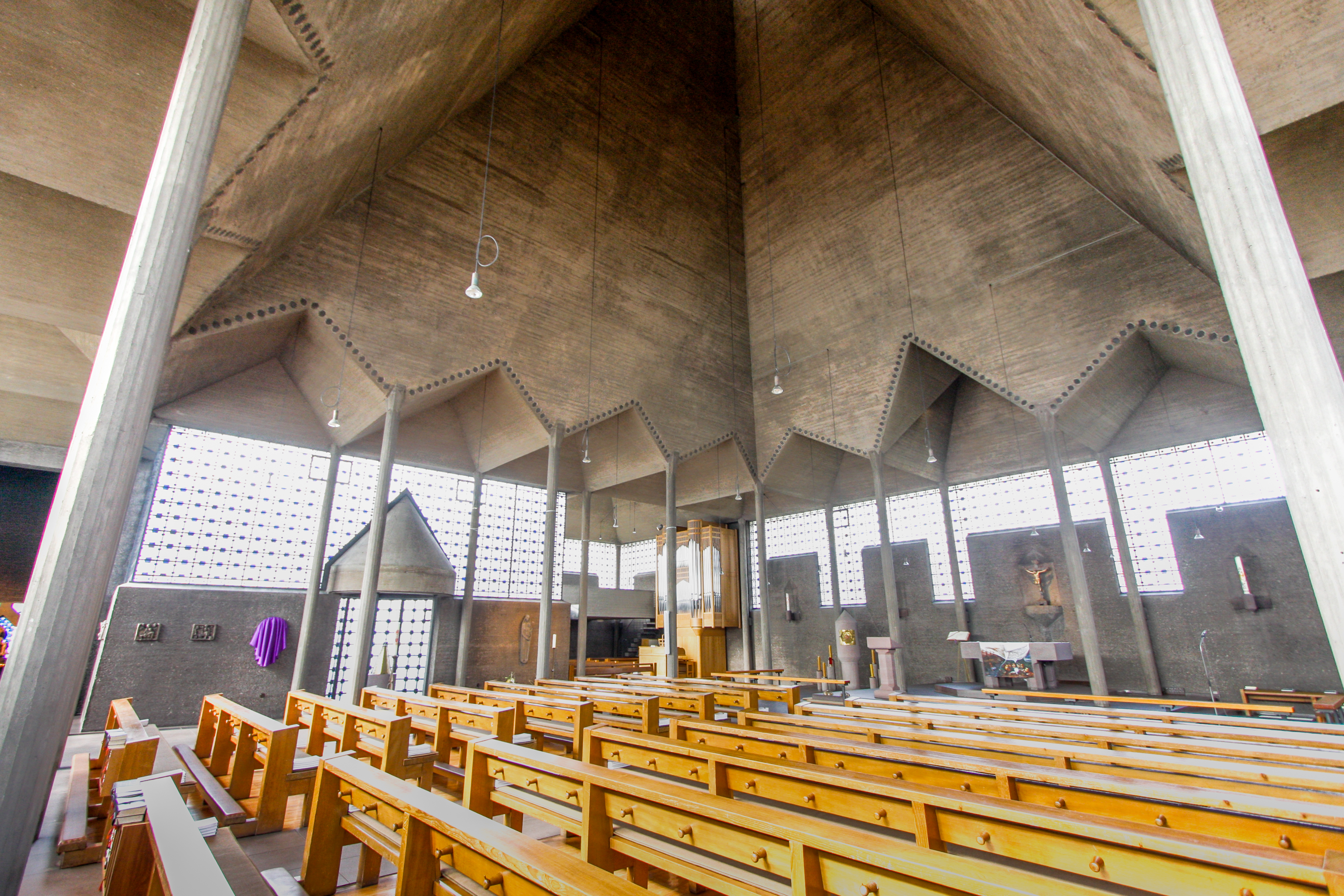 St. Fronleichnam in Köln Porz, Architekt: Gottfried Böhm